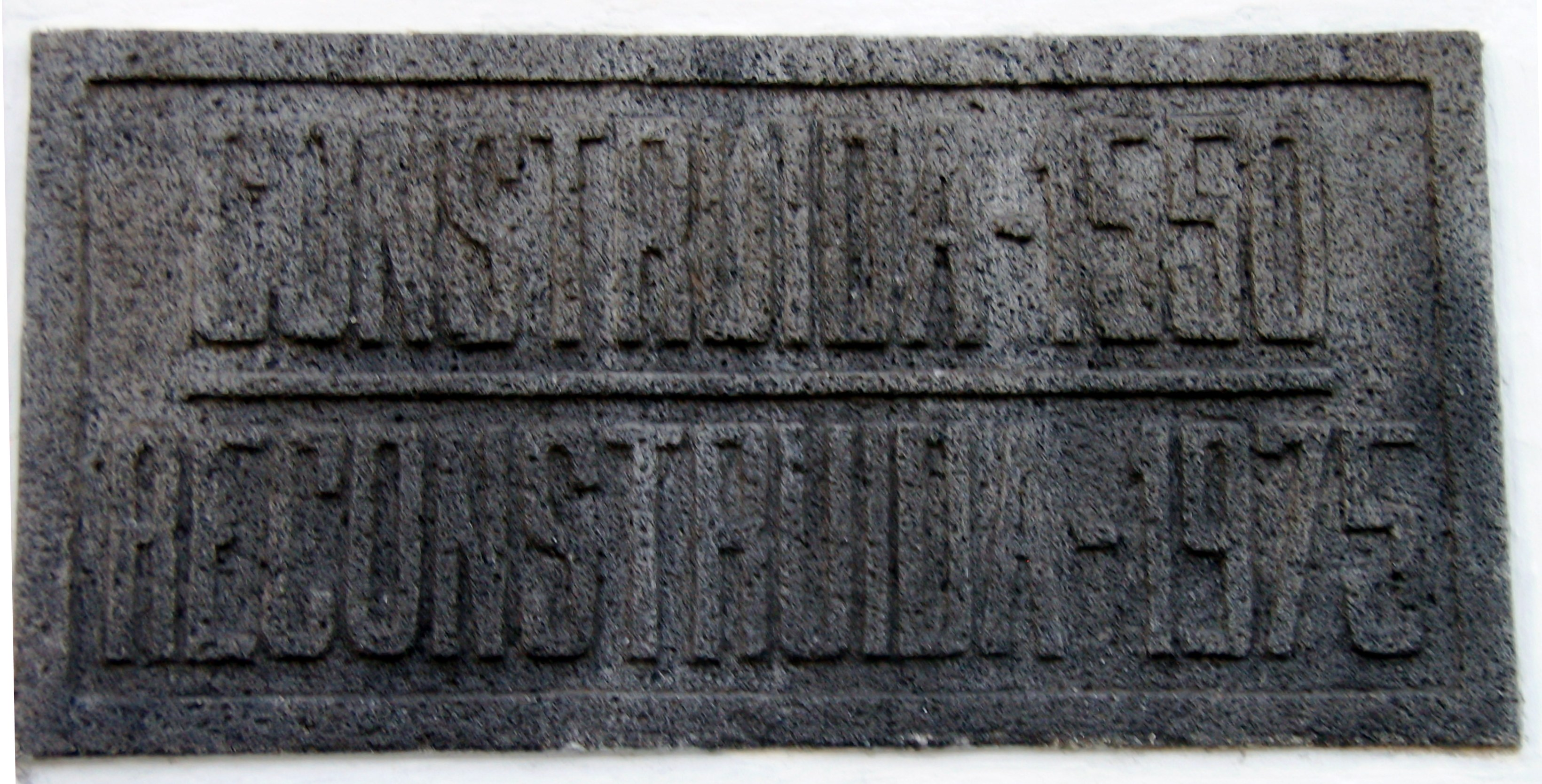 Capela de Santa Catarina, freguesia de São Pedro, concelho de Angra do Heroísmo, ilha Terceira, Região Autónoma dos Açores, Portugal.